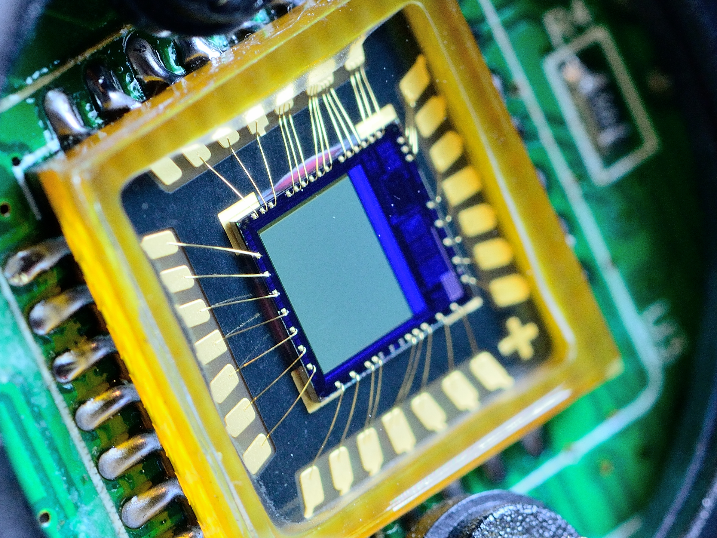 Sensor de imagen de microscopio usb tipo webcam